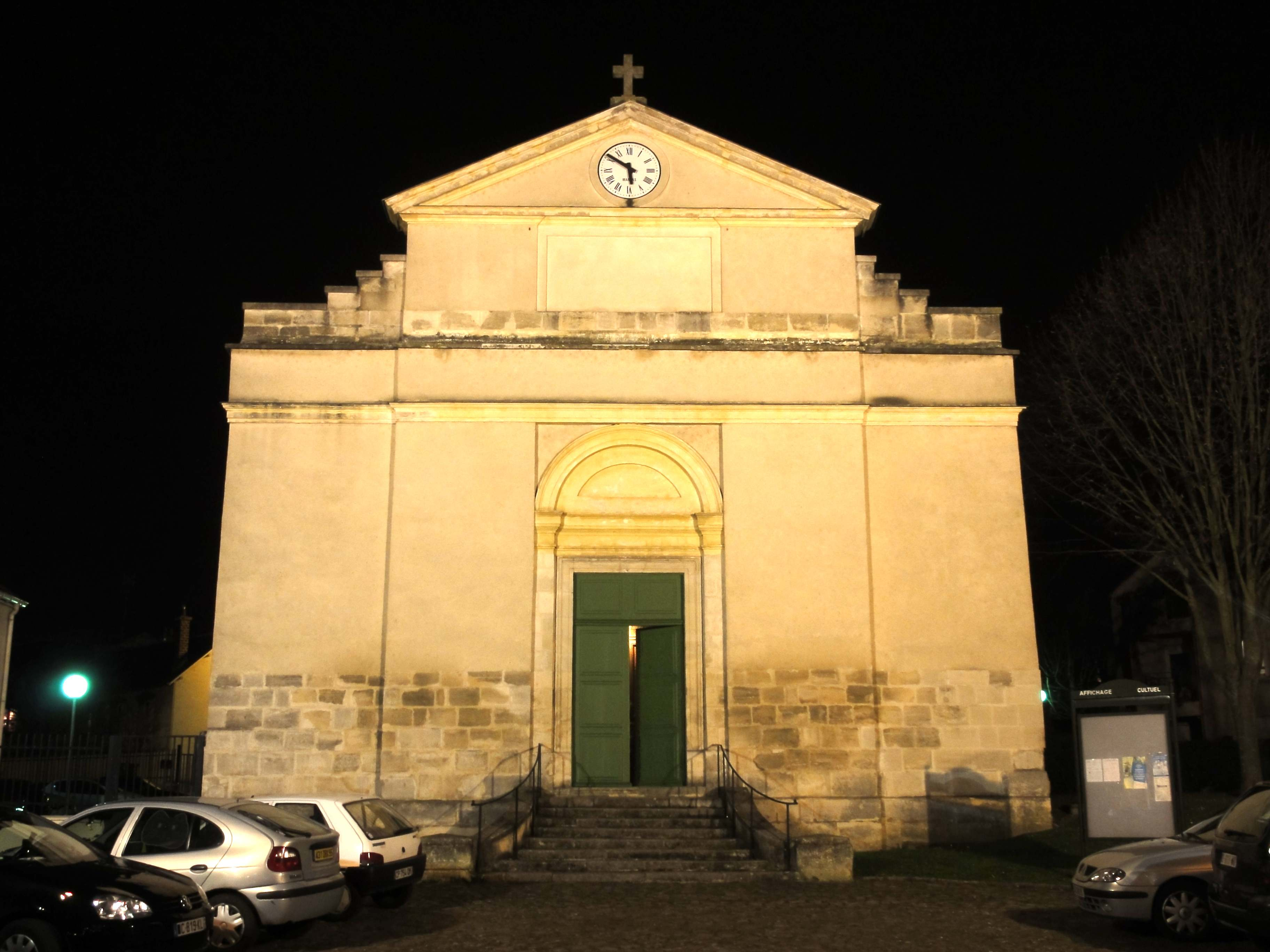 Façade occidentale.